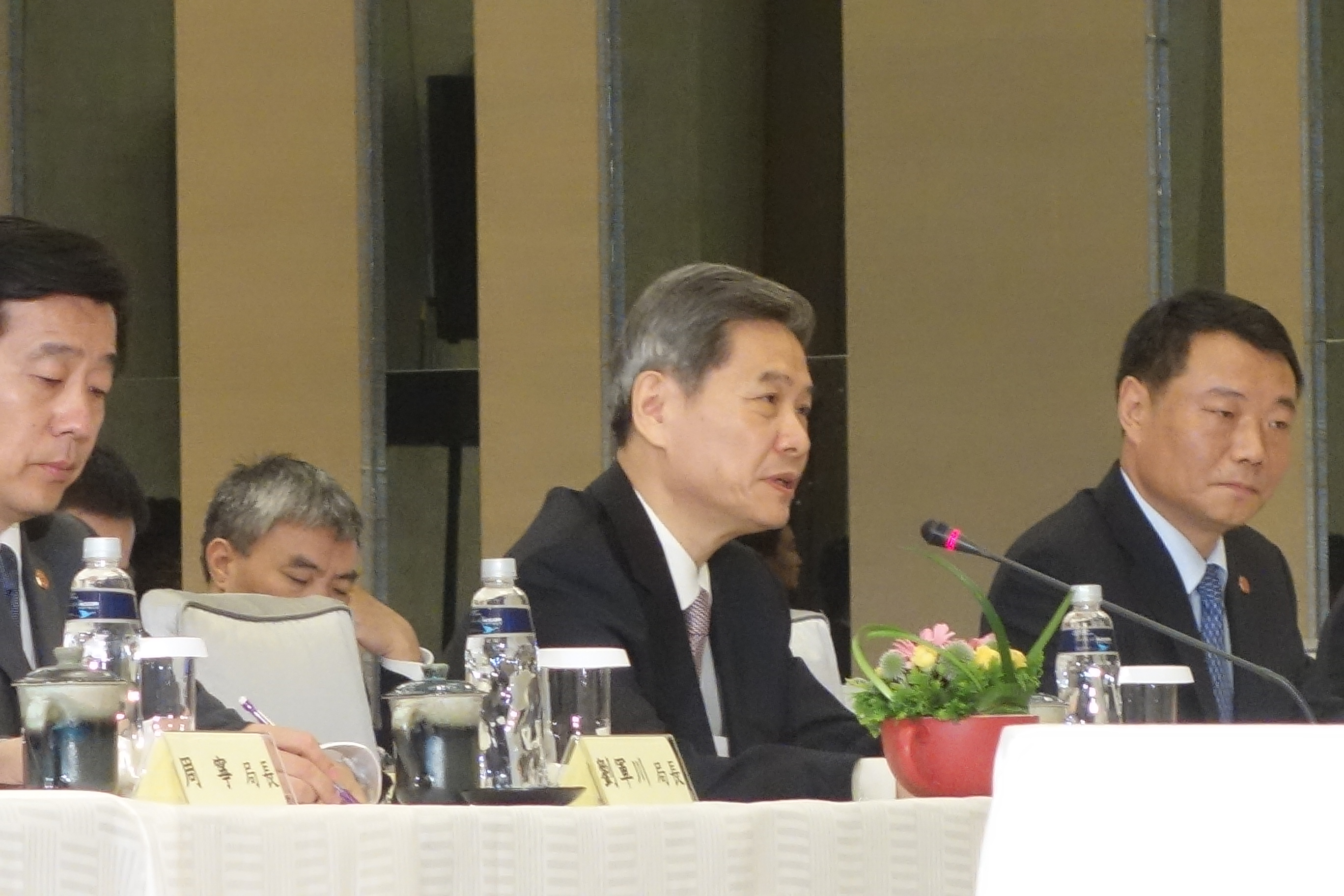 2014 Wang-Zhang Meeting 国台办主任张志军于两岸事务首长会议会前致词 (美国之音张佩芝拍摄)